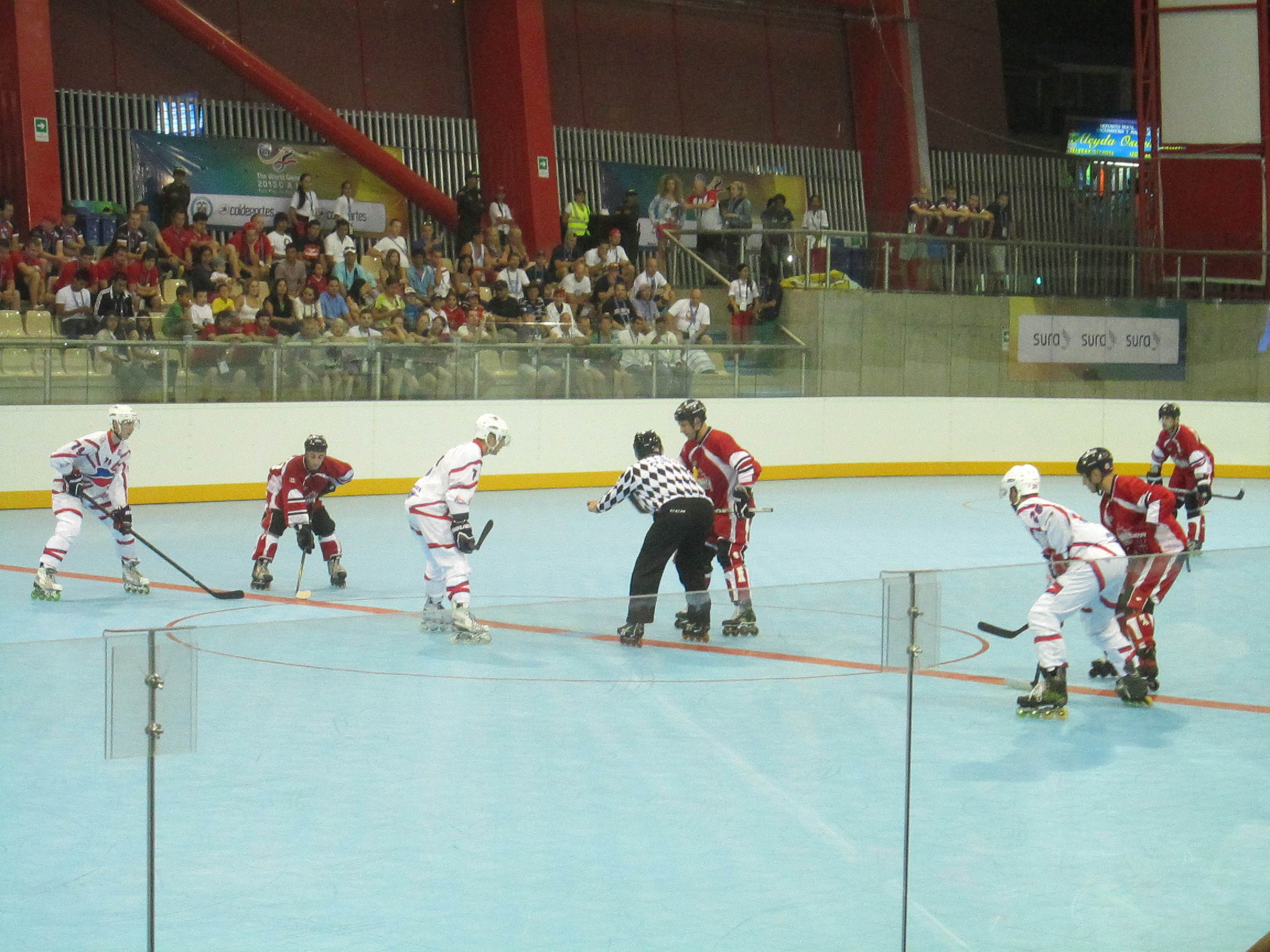 Juego entre Canadá y Francia - World Games 2013